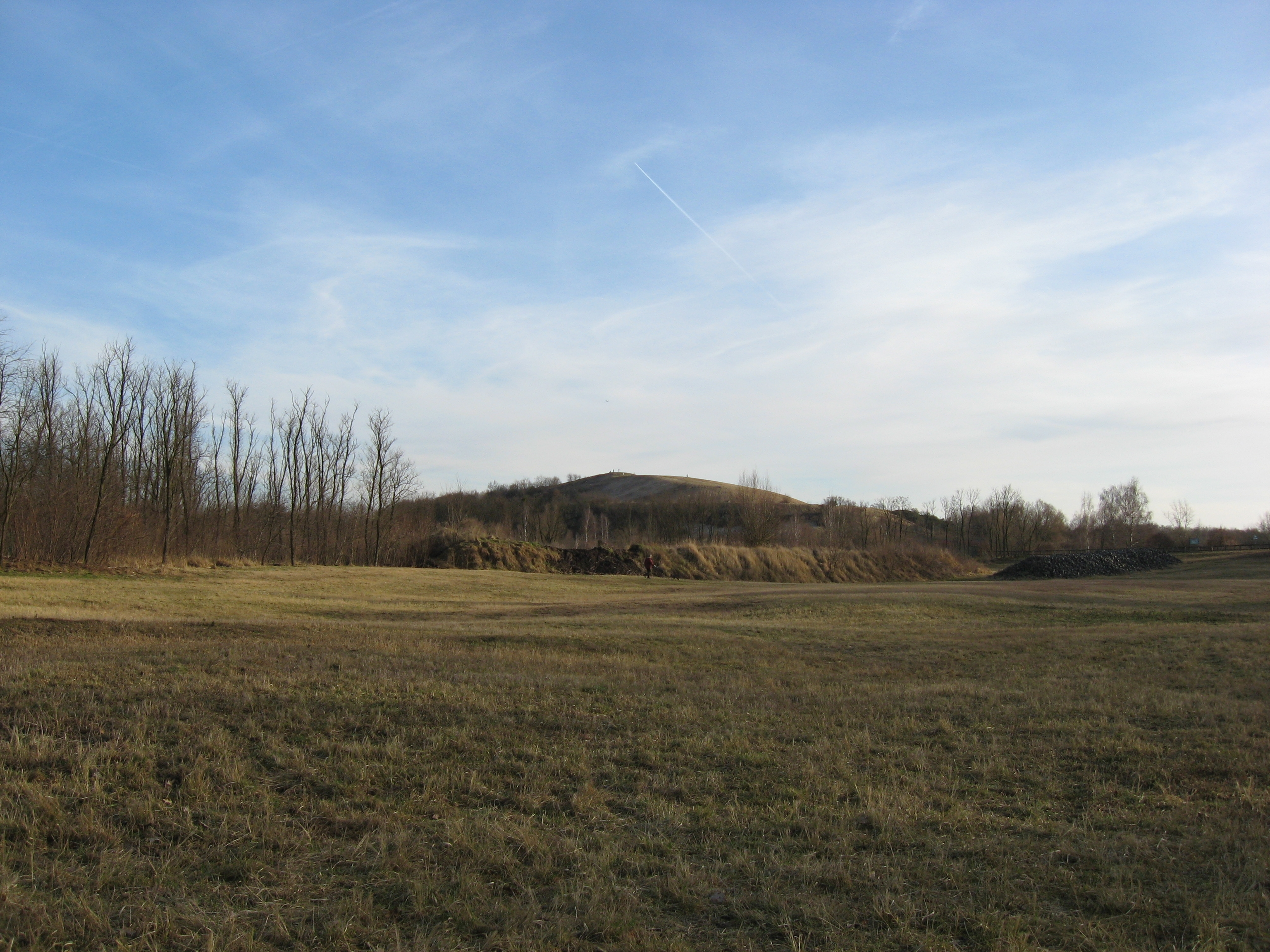 Blick auf den Hahneberg in Berlin